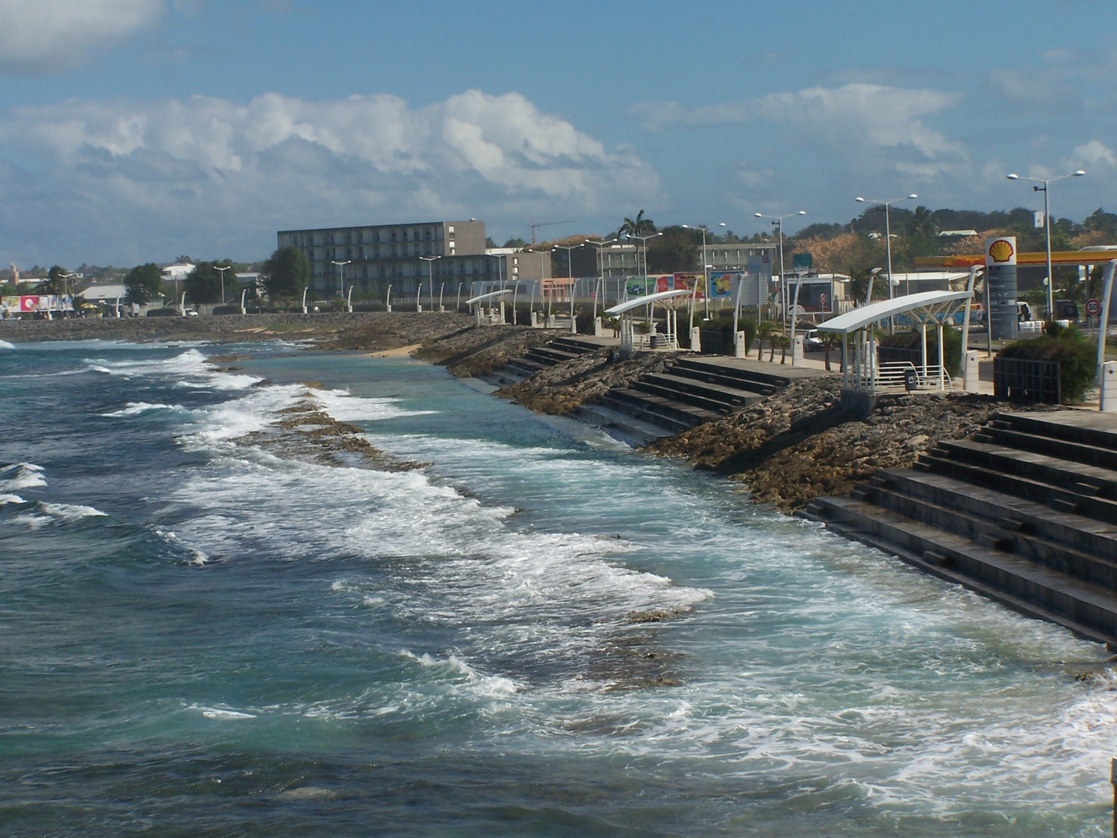 Le boulevard du centre ville longeant le littoral - Le Moule, Guadeloupe